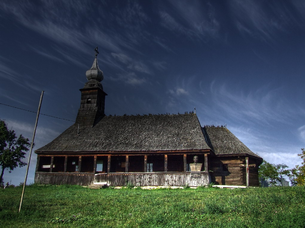 Sărmaşu